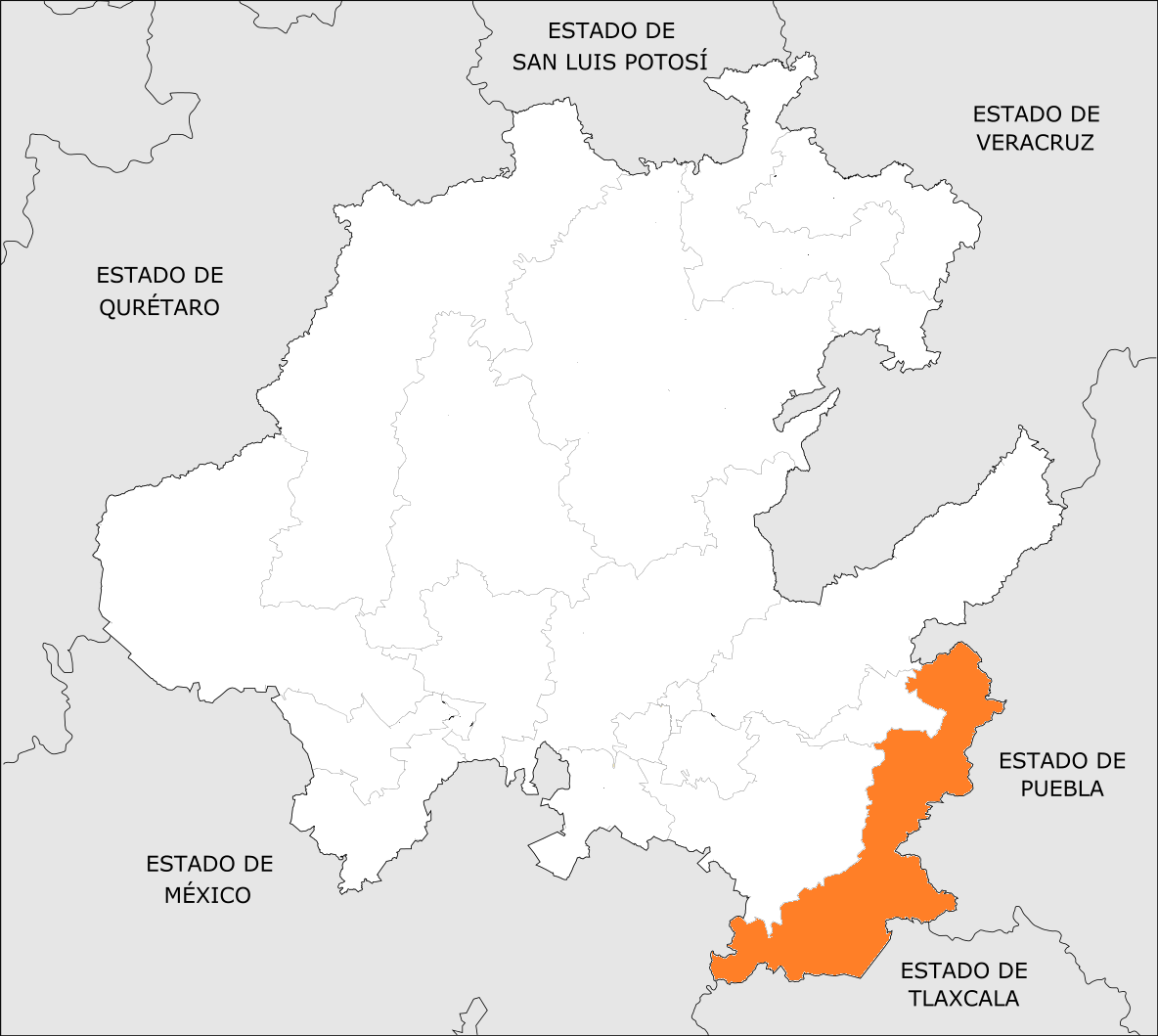 Distrito Electoral Local de Hidalgo 10